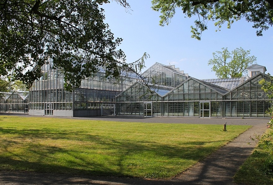 Botanischer Garten der Universität Leipzig, Südseite; Mangrovenhaus und beiderseits davon die Experimentalgewächshäuser; im Hintergrund ein Schaugewächshaus